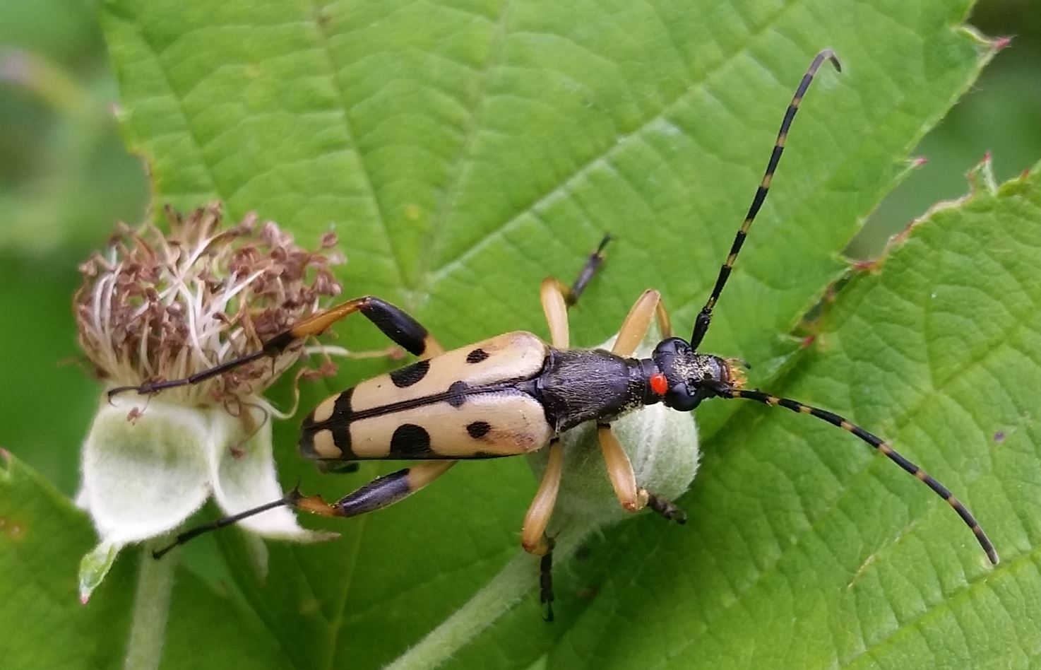 Gefleckter Schmalbock (Rutpela maculata), Männchen, am 15.06.2016 im Schwetzinger Hardt